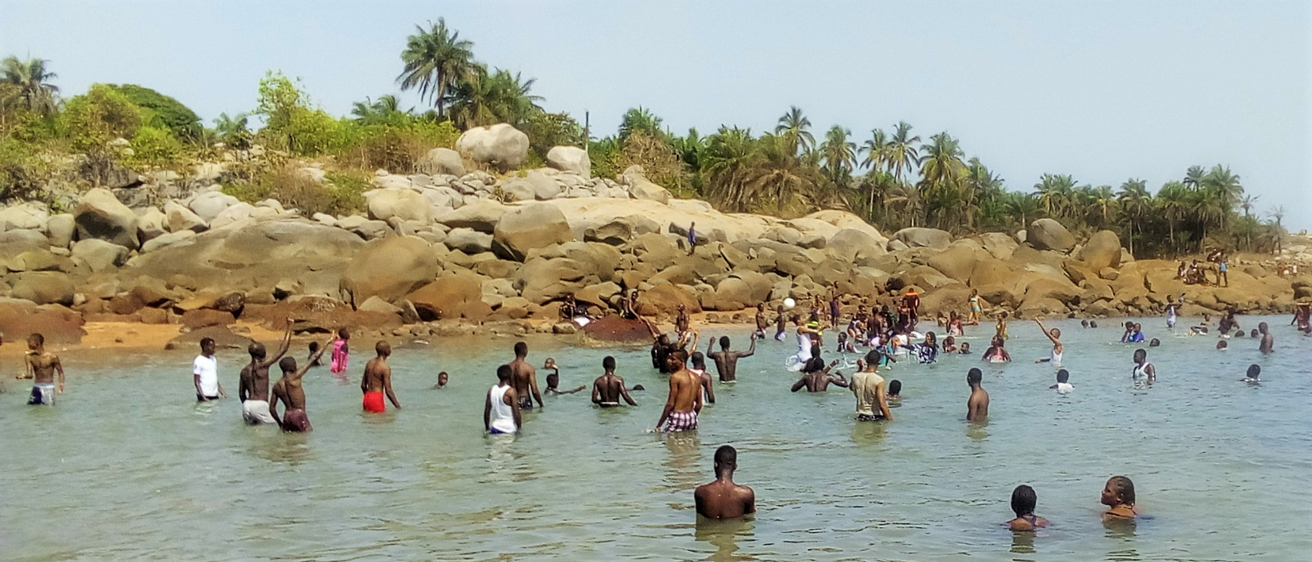 Groupe de jeunes qui s'amuse sur l'île de kassa